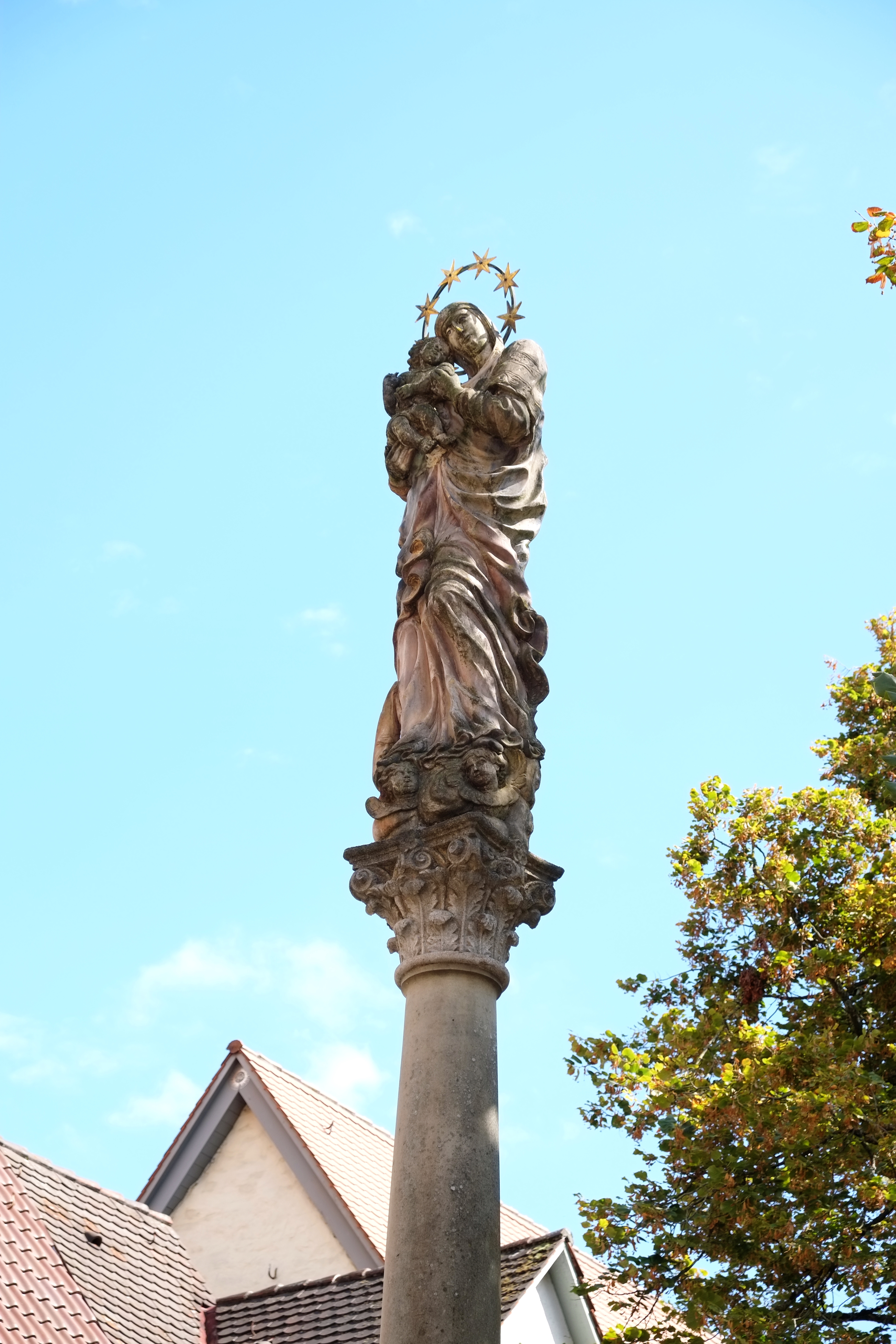 Mariensäule in Schwäbisch Gmünd (Baden-Württemberg, Deutschland)